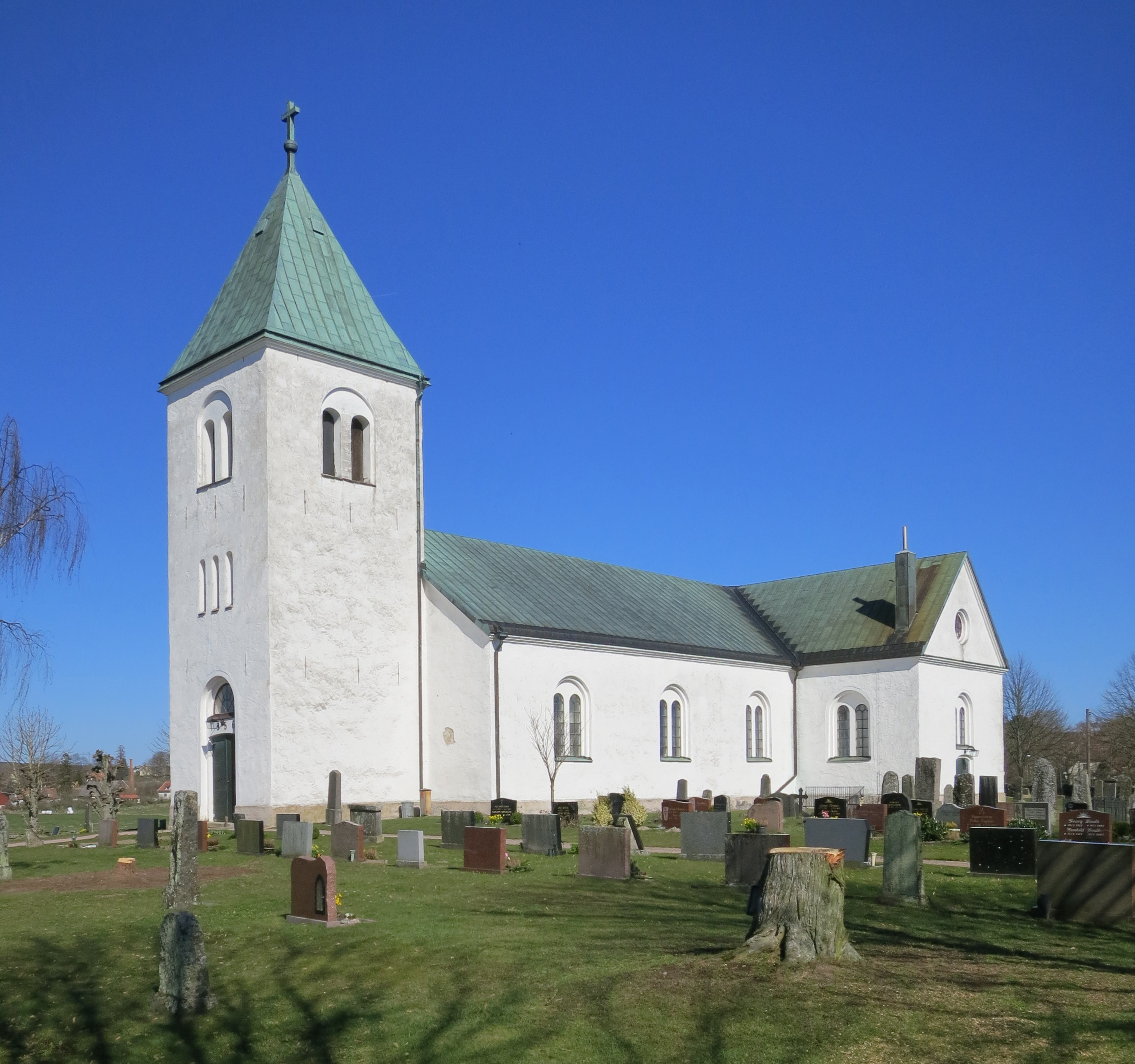 Oppmanna kyrka